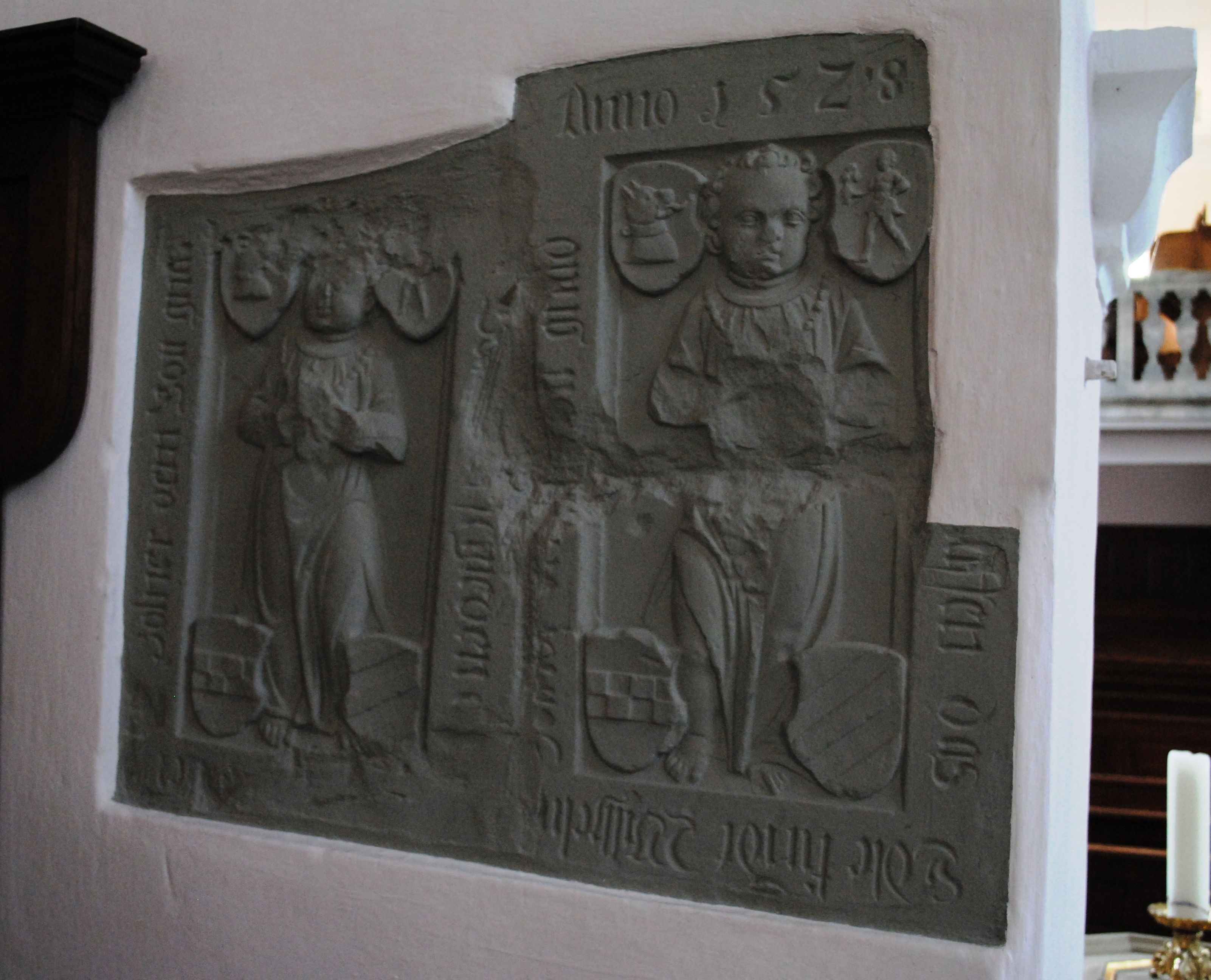 Epitaphien, Kirche Rimbach